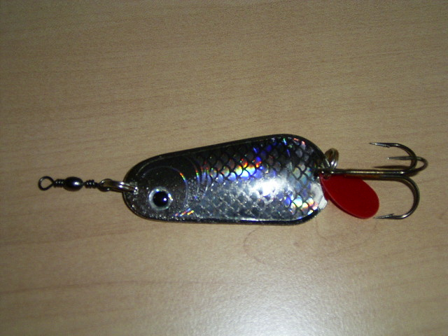 Blinker (Angelköder)